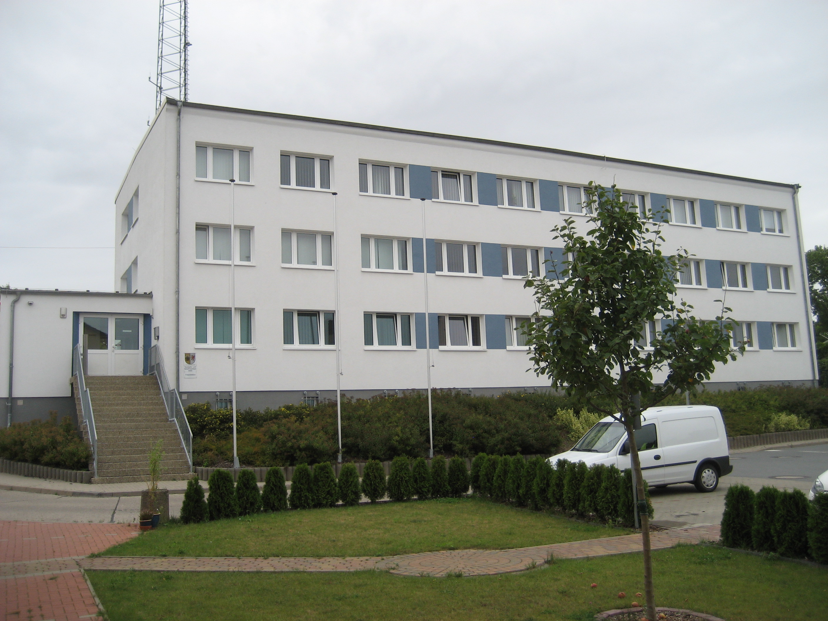 Gebäude in der Fichtestraße 5 in Altentrptow. Heute Polizeistation mit Autobahn- und Verkehrspolizeirevier, früher Standort des Amtsgerichts Altentreptow.